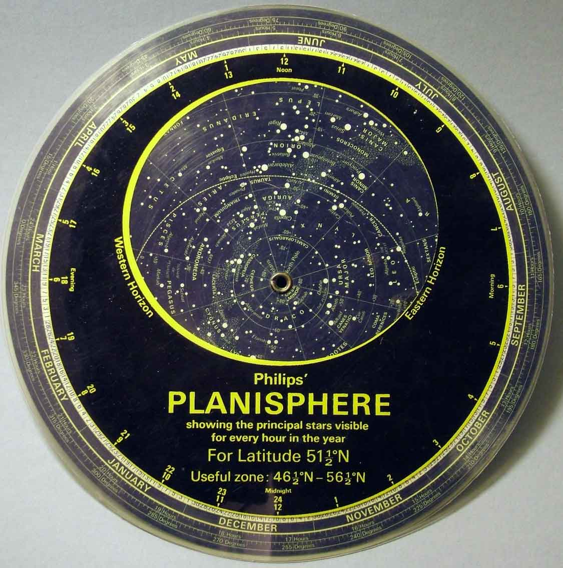 Planisphere